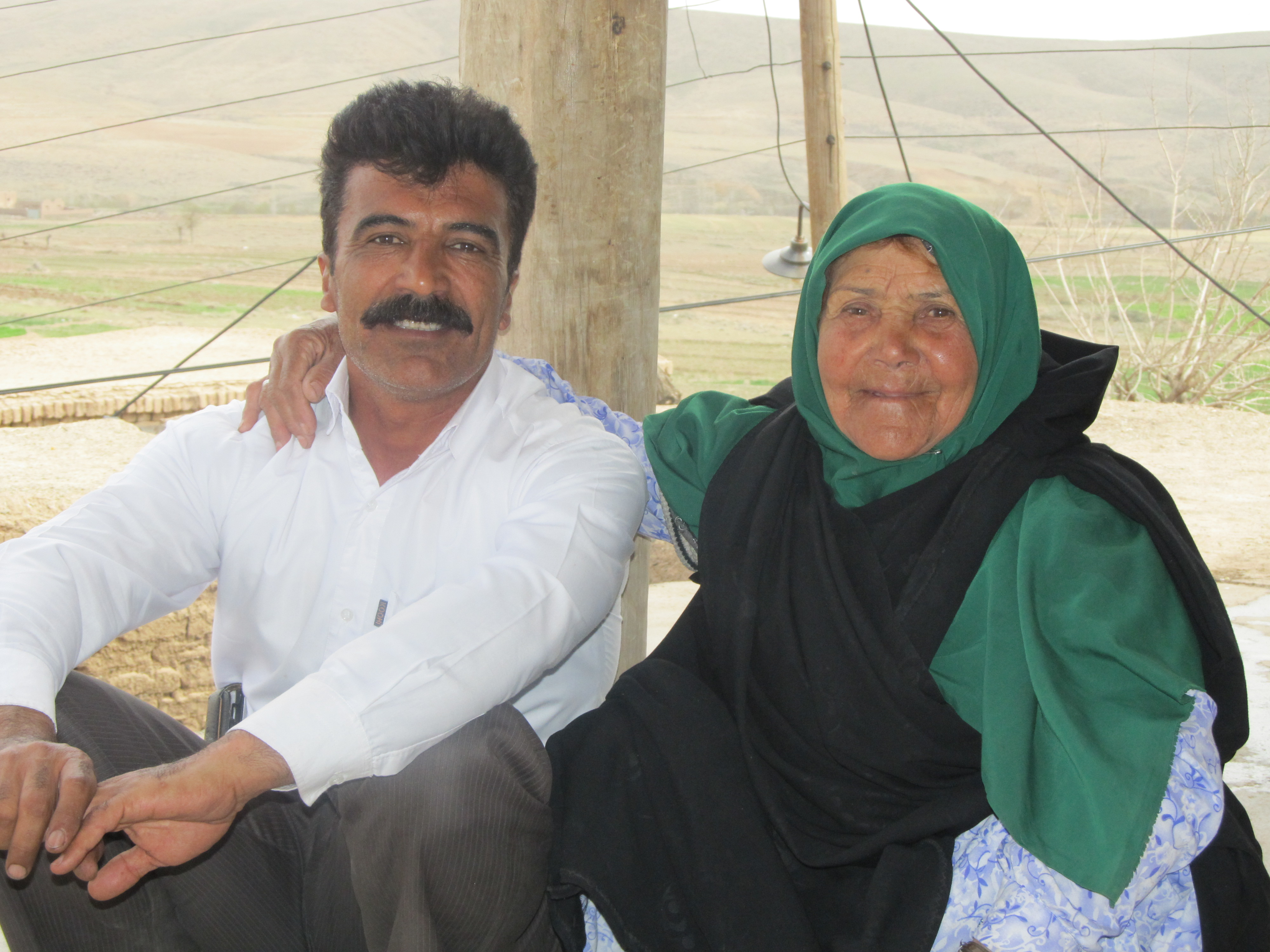 احترام به بزرگترها